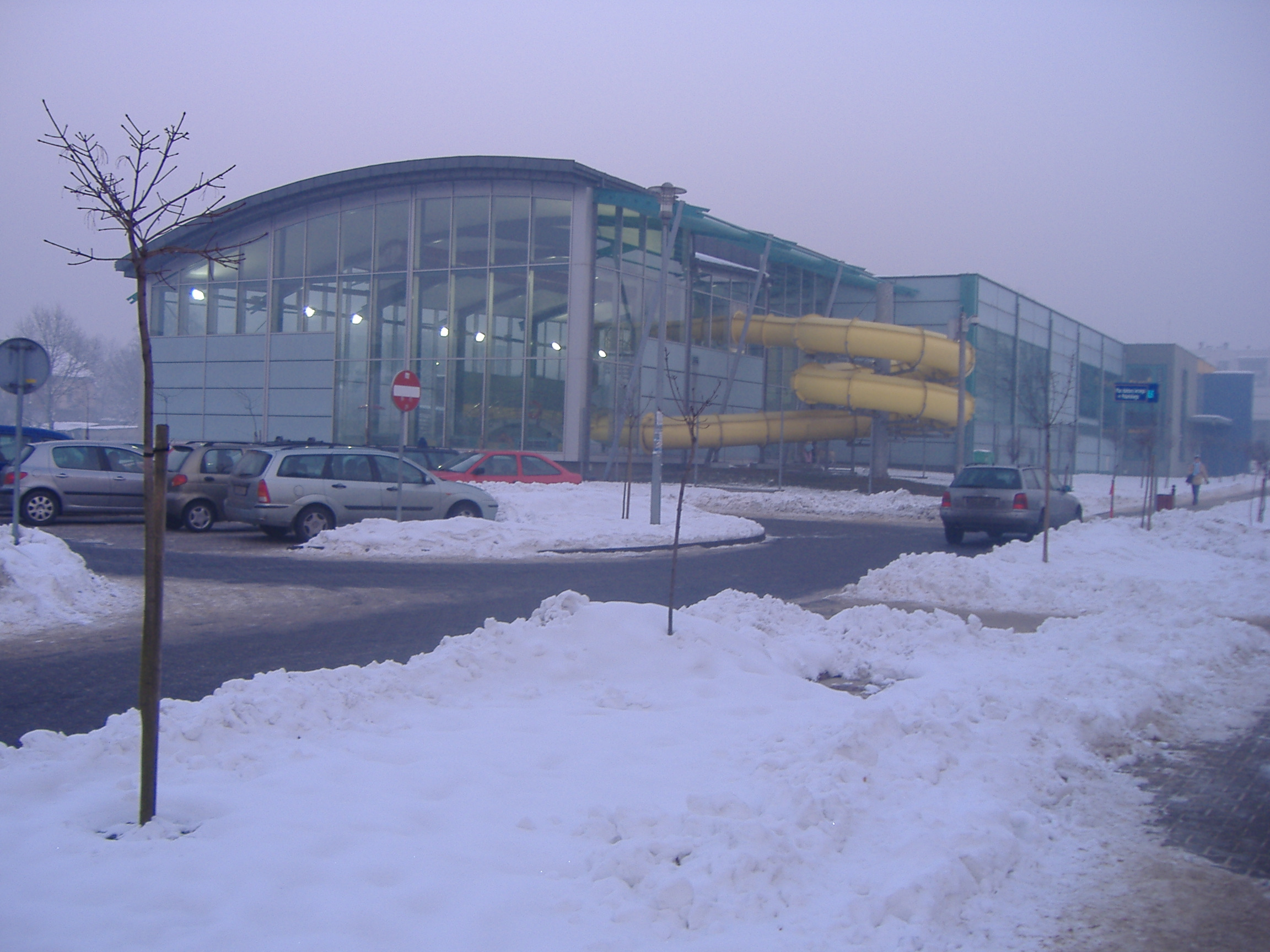 Skawina - basen.